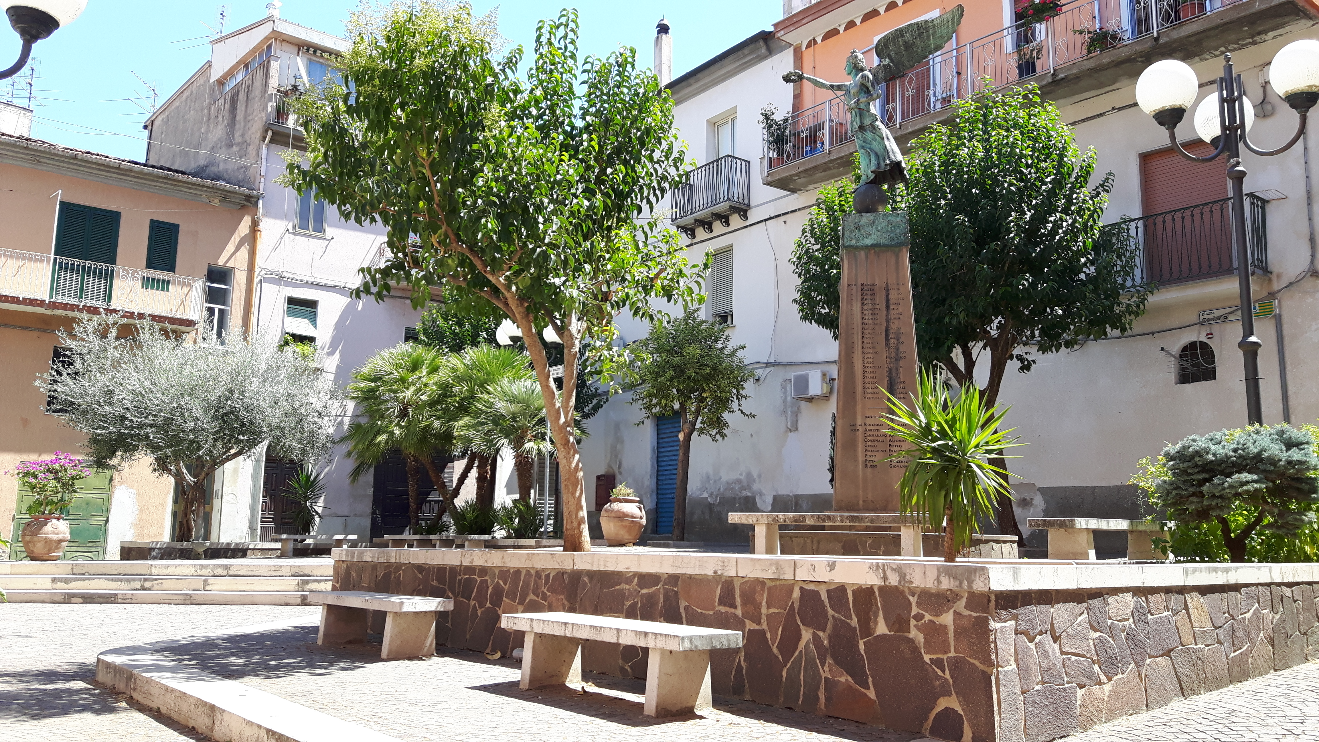 Piazza Garibaldi. Conosciuta anche come "Il pozzillo" per la presenza di un antico pozzo pubblico. E' da sempre considerato il centro del paese, ed era anche il luogo dove per secoli si sono concentrati i principali esercizi commerciali come la farmacia. Negli anni duemila, dopo la chiusura di quasi tutti i negozi che vi si affacciavano, la piazzetta al visitatore risulta deserta e poco attrattiva.